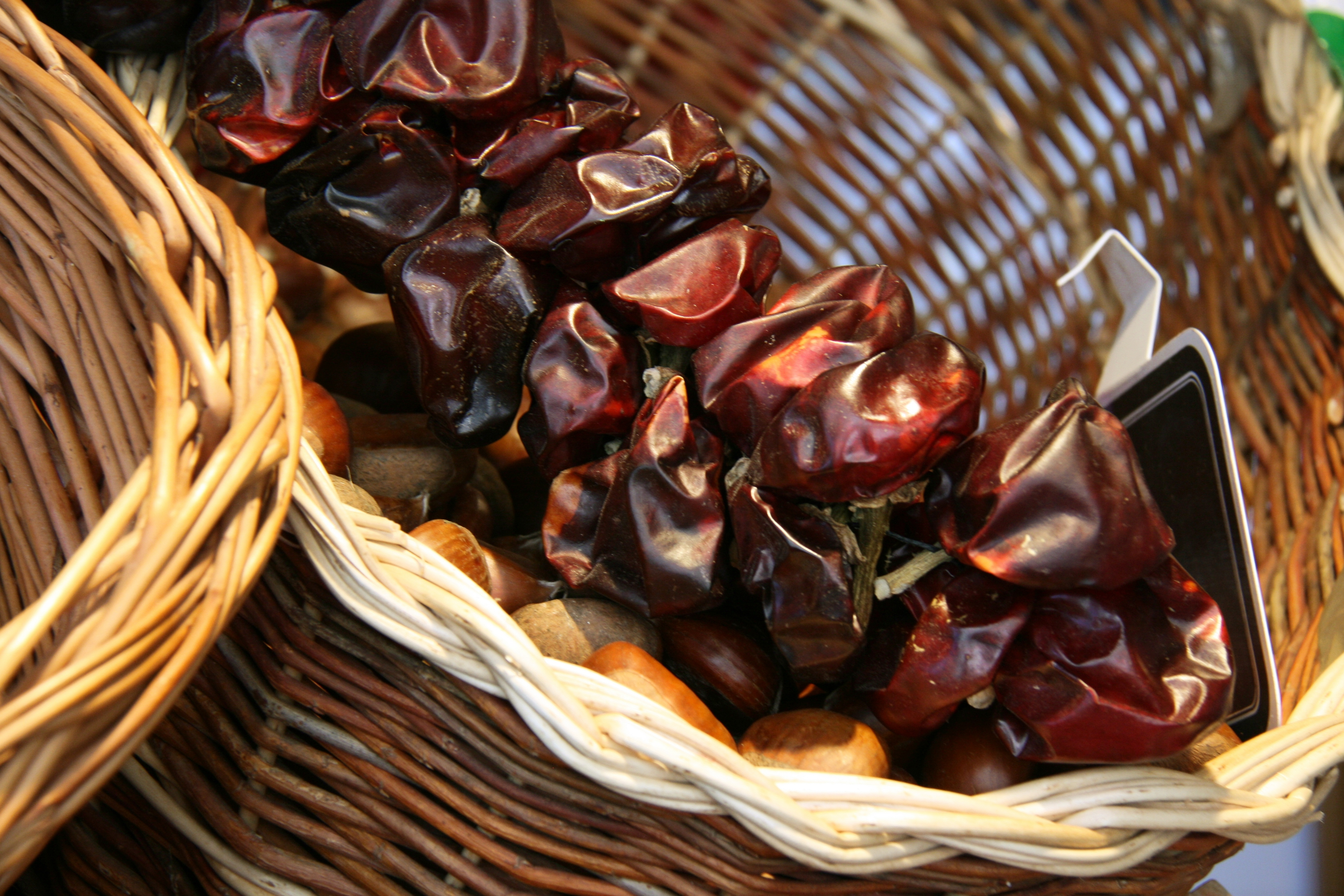 Ñoras